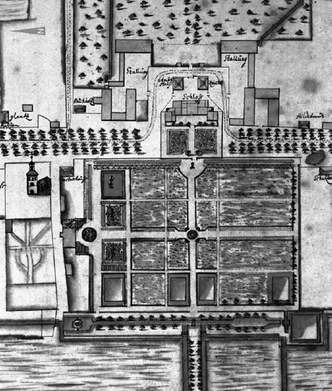 Ausschnitt aus Geometrischer Grundriss des Dorffs Malchau. Darstellung des Schlosses (nach Bauphase II) mit Nebengebäuden, Gutshof, umgeleiteter Dorfstraße, Baumgarten (Ost) und Lustgarten mit Orangeriehaus (West).